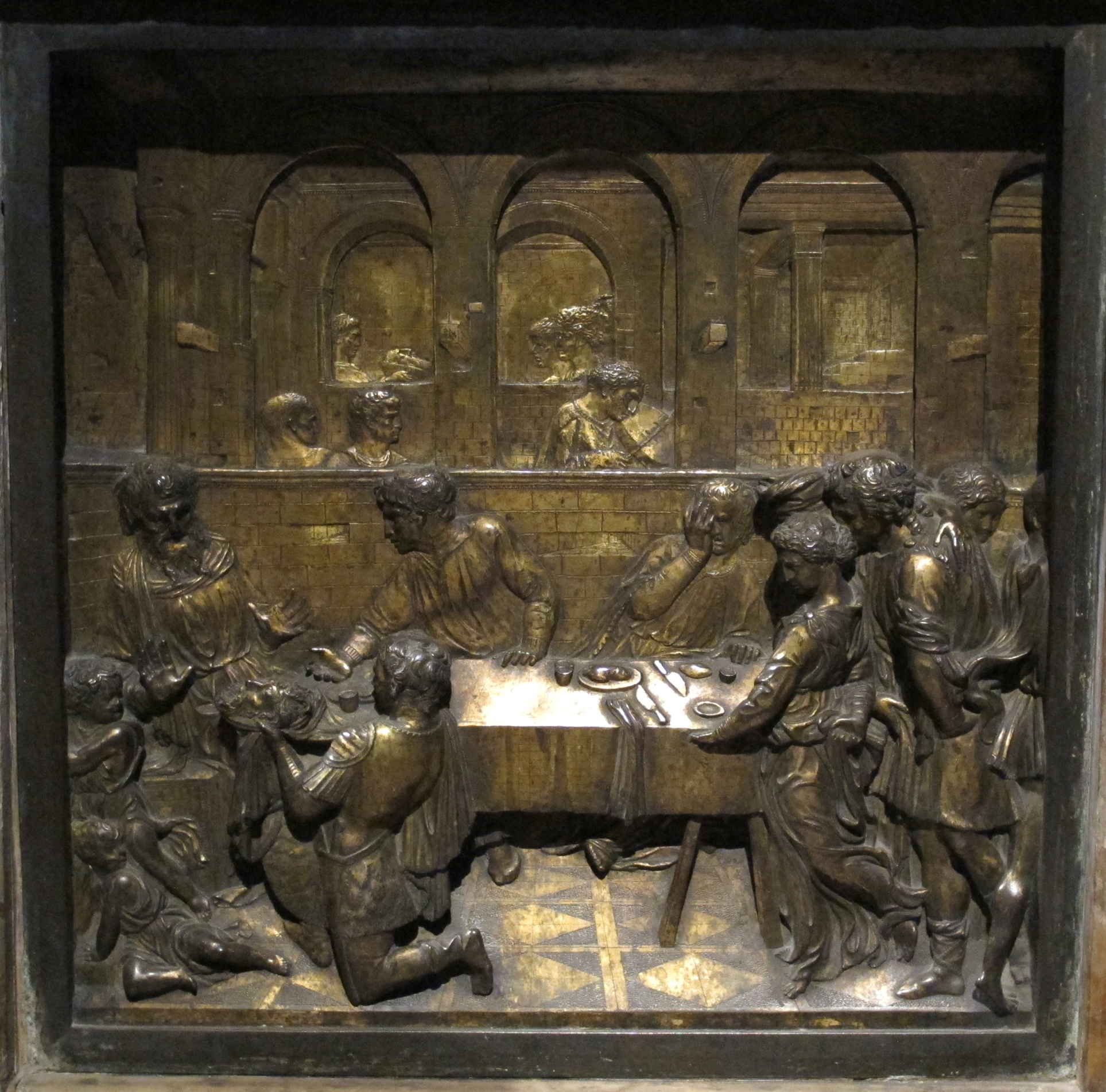 Formella 06, donatello, banchetto di erode, 1427